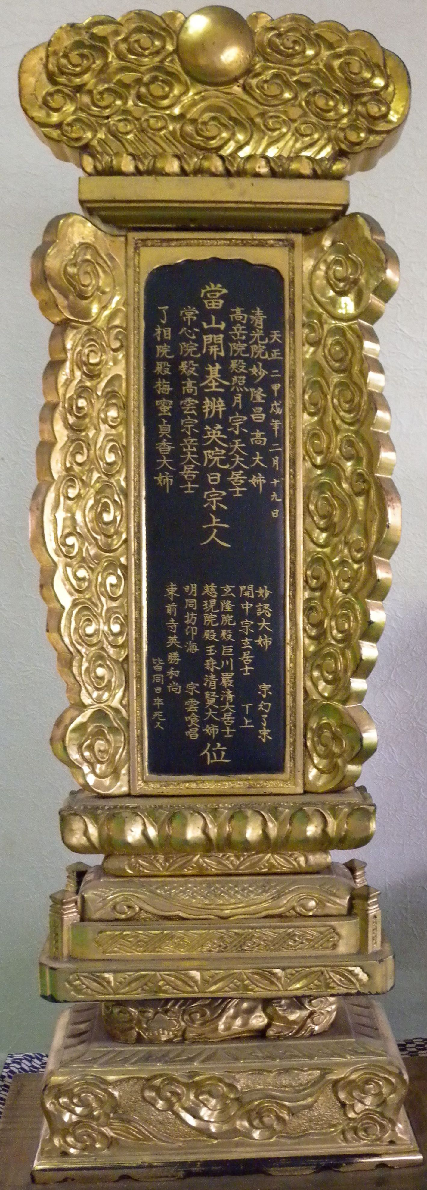 妙隆寺の位牌